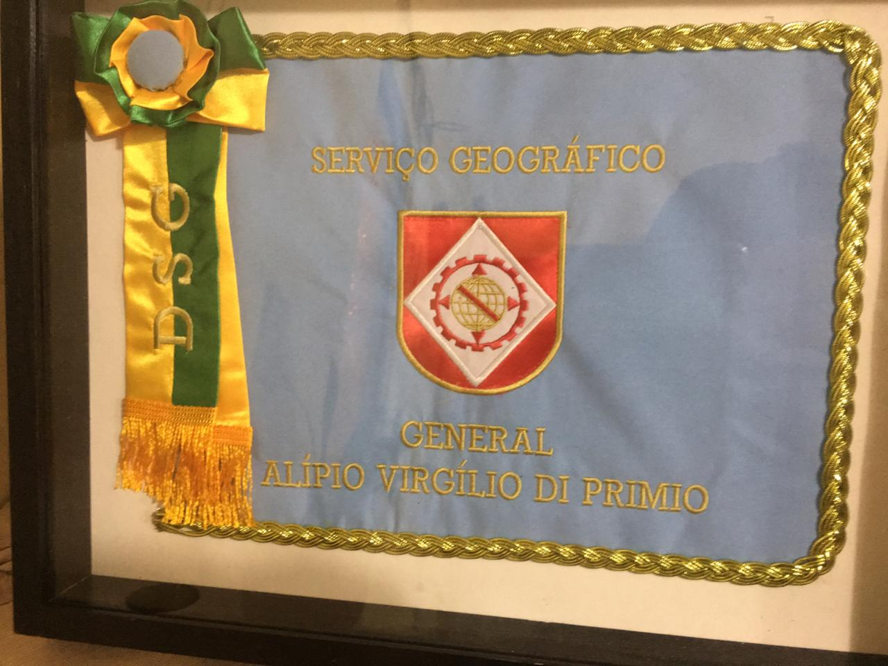 Estandarte em forma retangular, tipo bandeira universal, franjado de ouro. Campo de azul-turquesa. No coração, o escudo da Diretoria de Serviço Geográfico, em suas cores. No chefe do estandarte, o dístico ‘SERVIÇO GEOGRÁFICO’ e, na ponta do mesmo, os dísticos ‘GENERAL’ e ‘ALPÍNO VIRGÍLIO DI PRIMIO’, ambos de ouro.